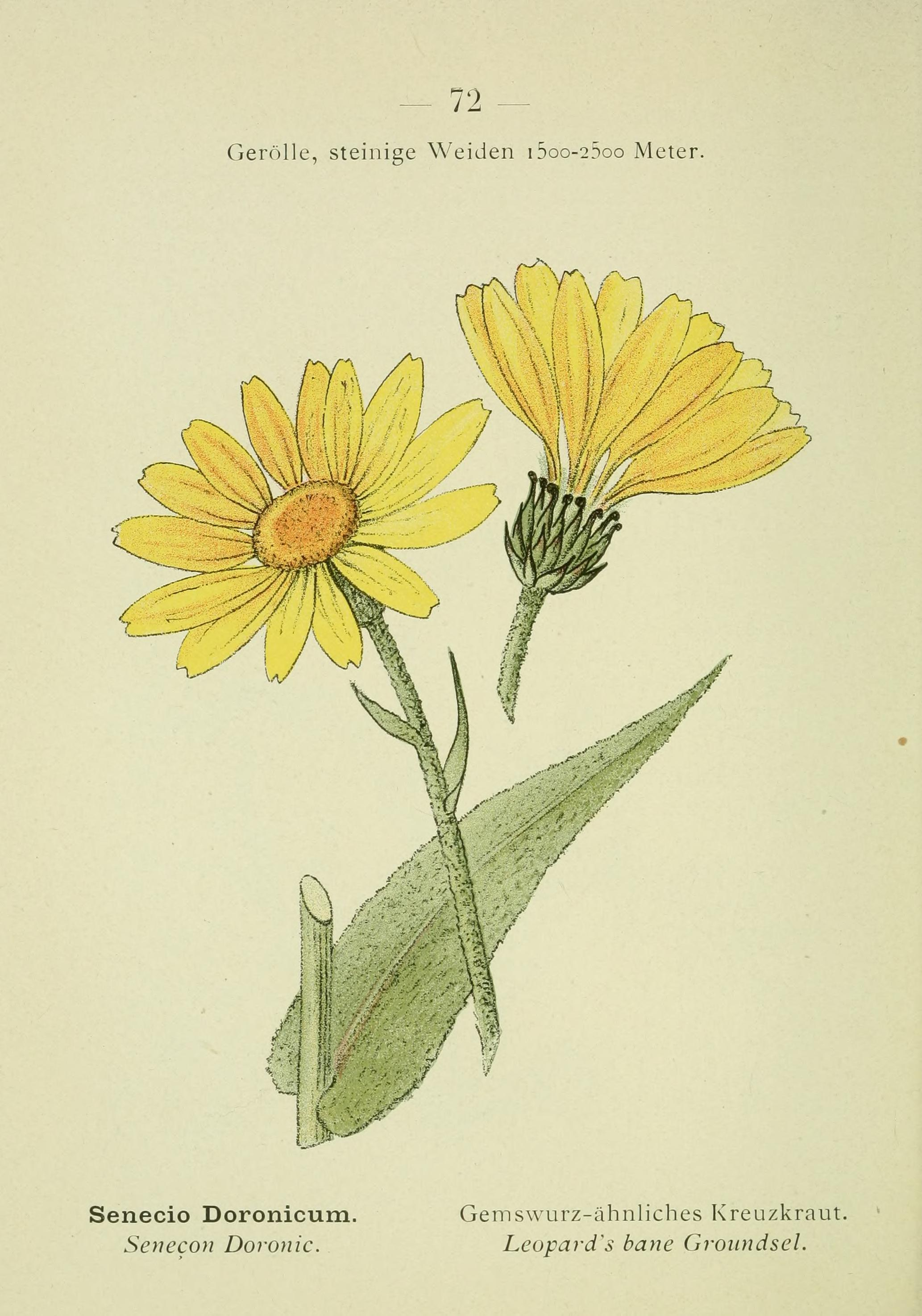 Alpen-Flora : Westalpen / von G. Senn ; mit 144 farbigen Tafeln nach am Standorte gemalten Aquarellen von C. Kaftner.